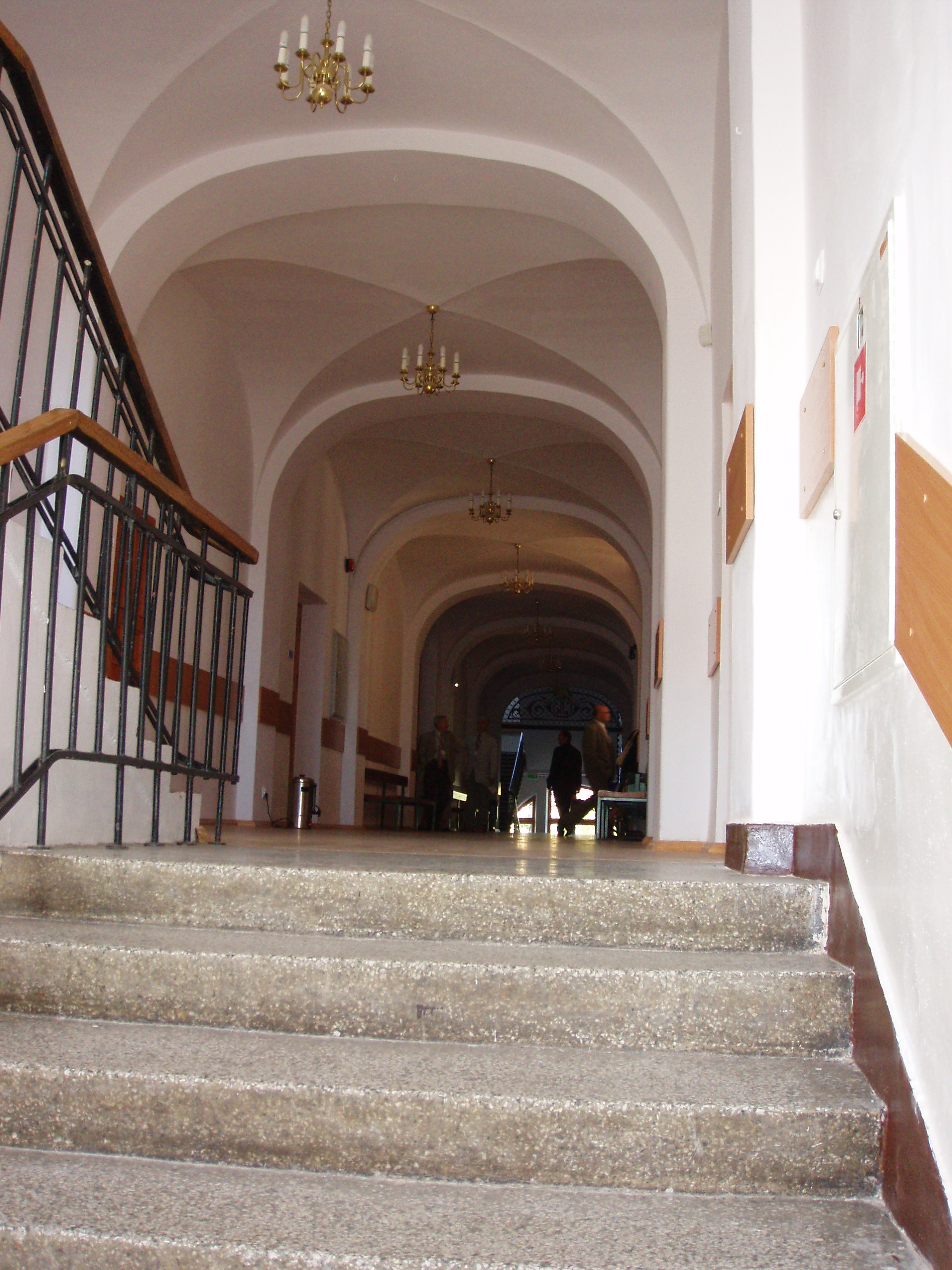 Płock, L.O. im. W. Jagiełły, korytarz na I piętrze